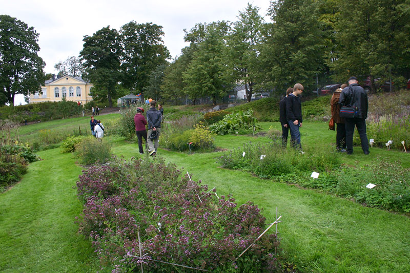 Kumpulan Kasvitieteellinen puutarha / Botanic Garden at Kumpula, Helsinki, Finland